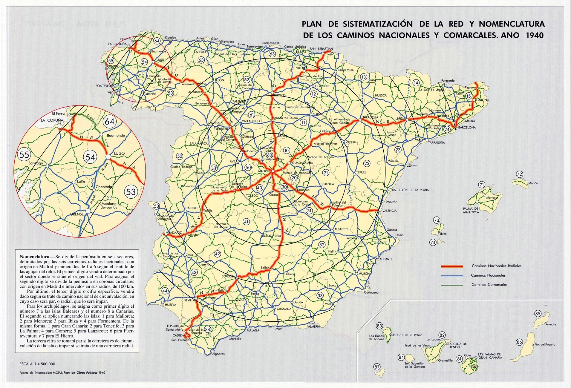 Sistema adoptado por el Plan de Obras Públicas de 1940 (Plan Peña) para la nomenclatura de la Red de Carreteras de España.